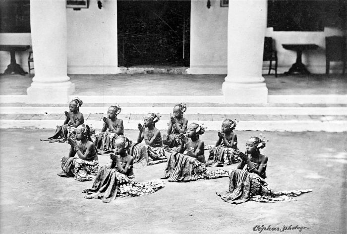 Repronegatief. Hofdansers dansen een serimpi